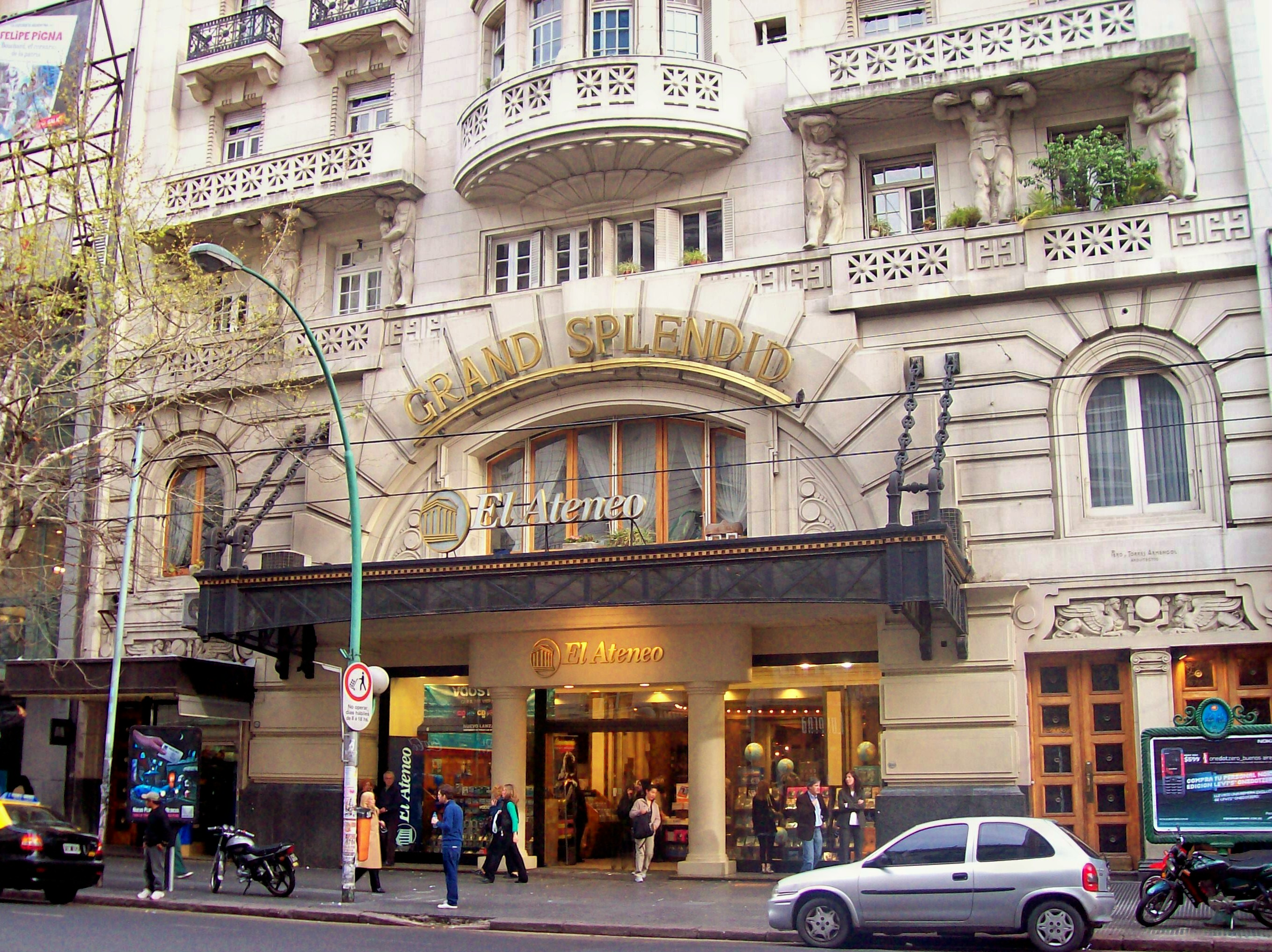 Frente de la librería Ateneo Grand Splendid, Avenida Santa Fe 1860 (vereda sur), en Recoleta, Buenos Aires.